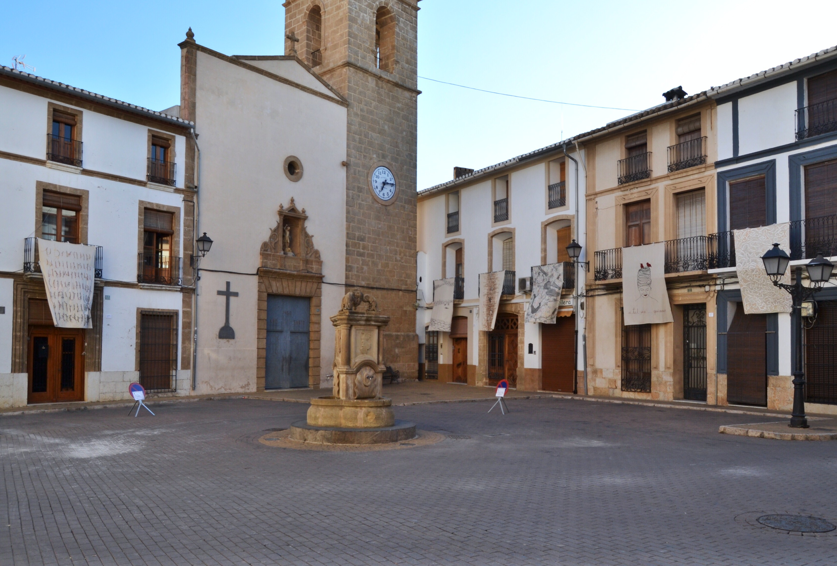 Plaça Vella de Gata de Gorgos.